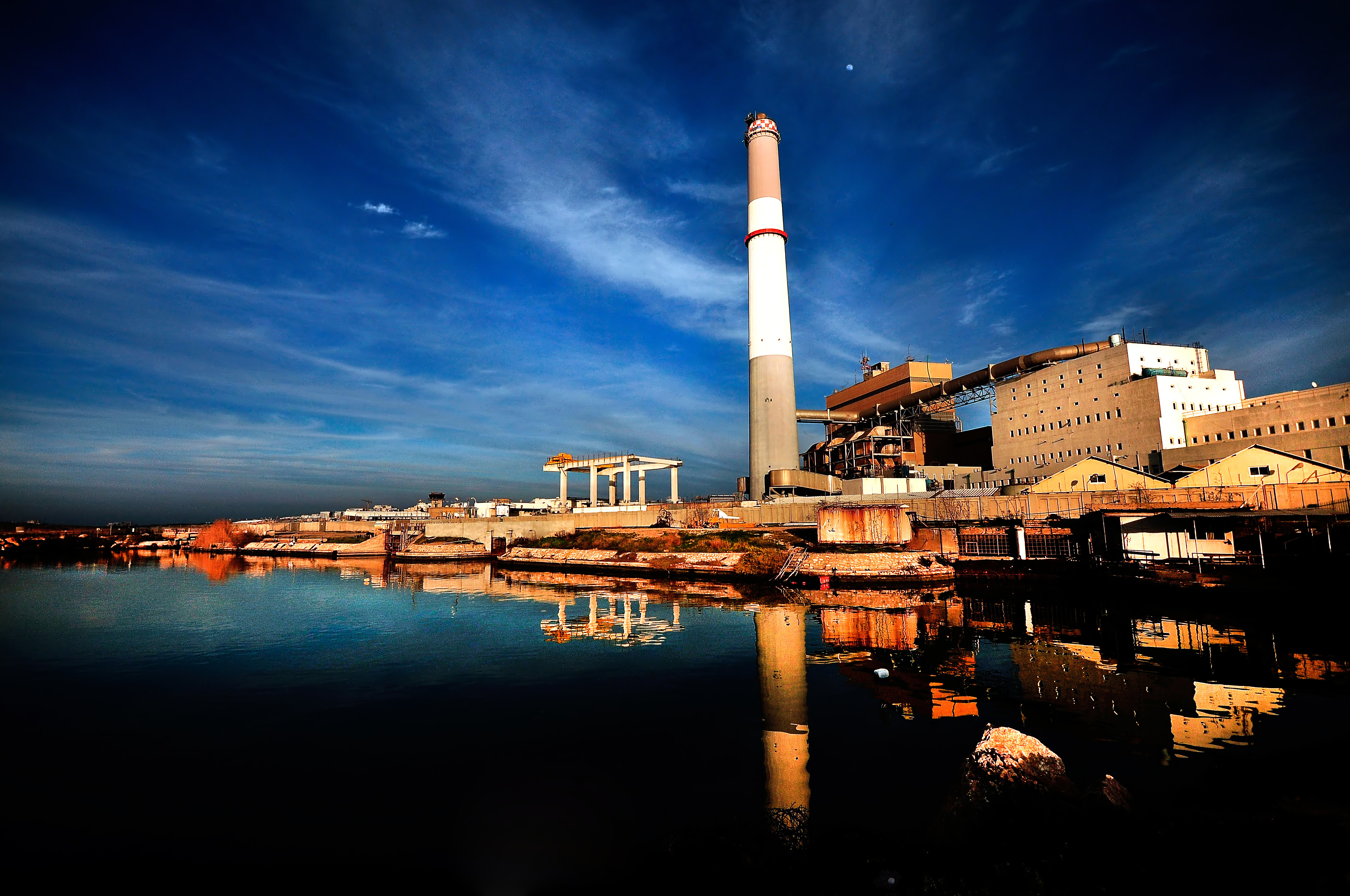 רדינג היא תחנת כוח לייצור חשמל הממוקמת בצפון תל אביב, בצמוד לשפך הירקון. התחנה נקראת על שמו של הלורד רופוס דניאל אייזקס, המרקיז מרדינג. תחנת הכוח רדינג החלה להיבנות בסוף שנת 1937 והושלמה בספטמבר 1938.